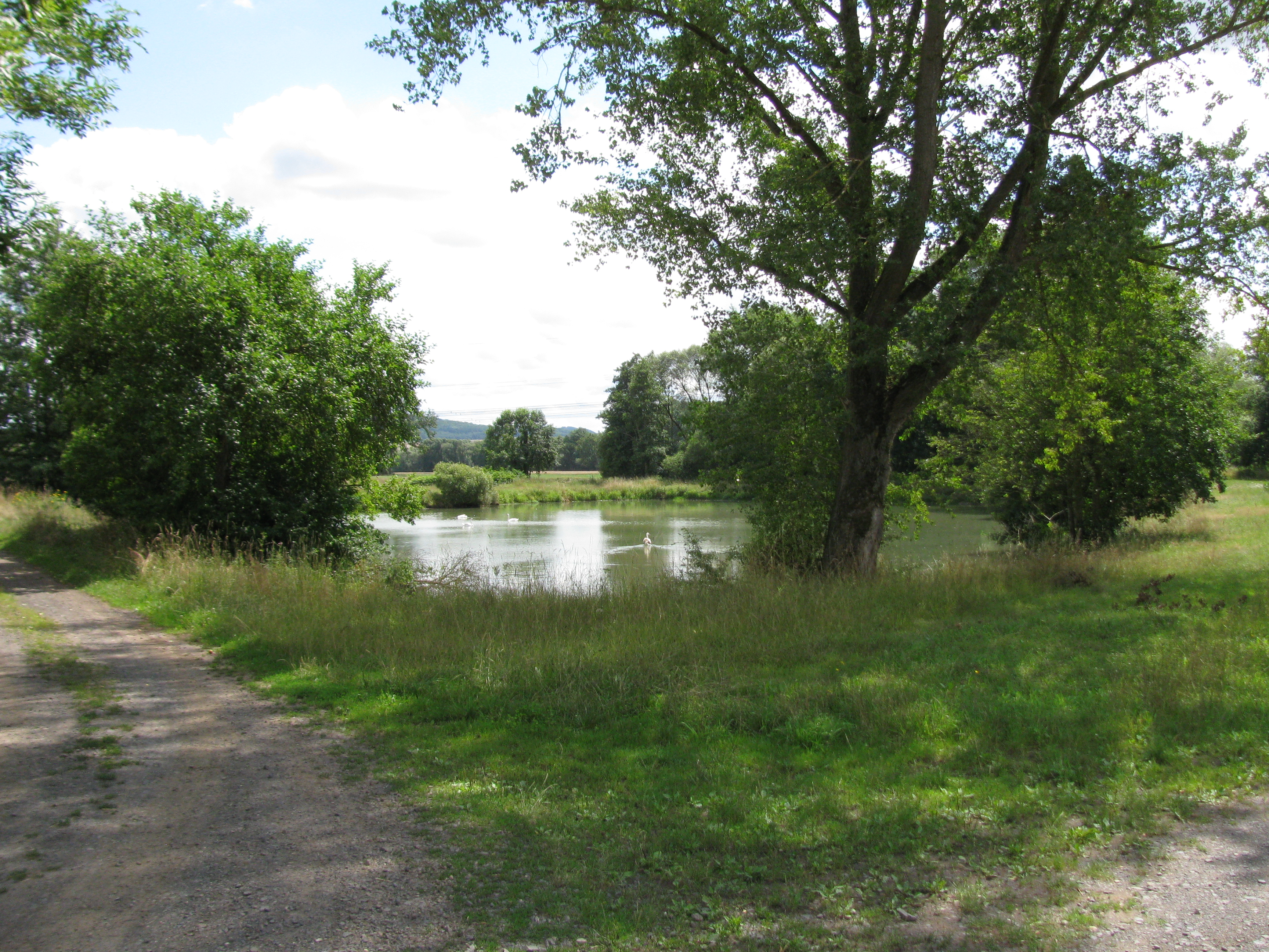 Teich in der Ederniederung bei Cappel